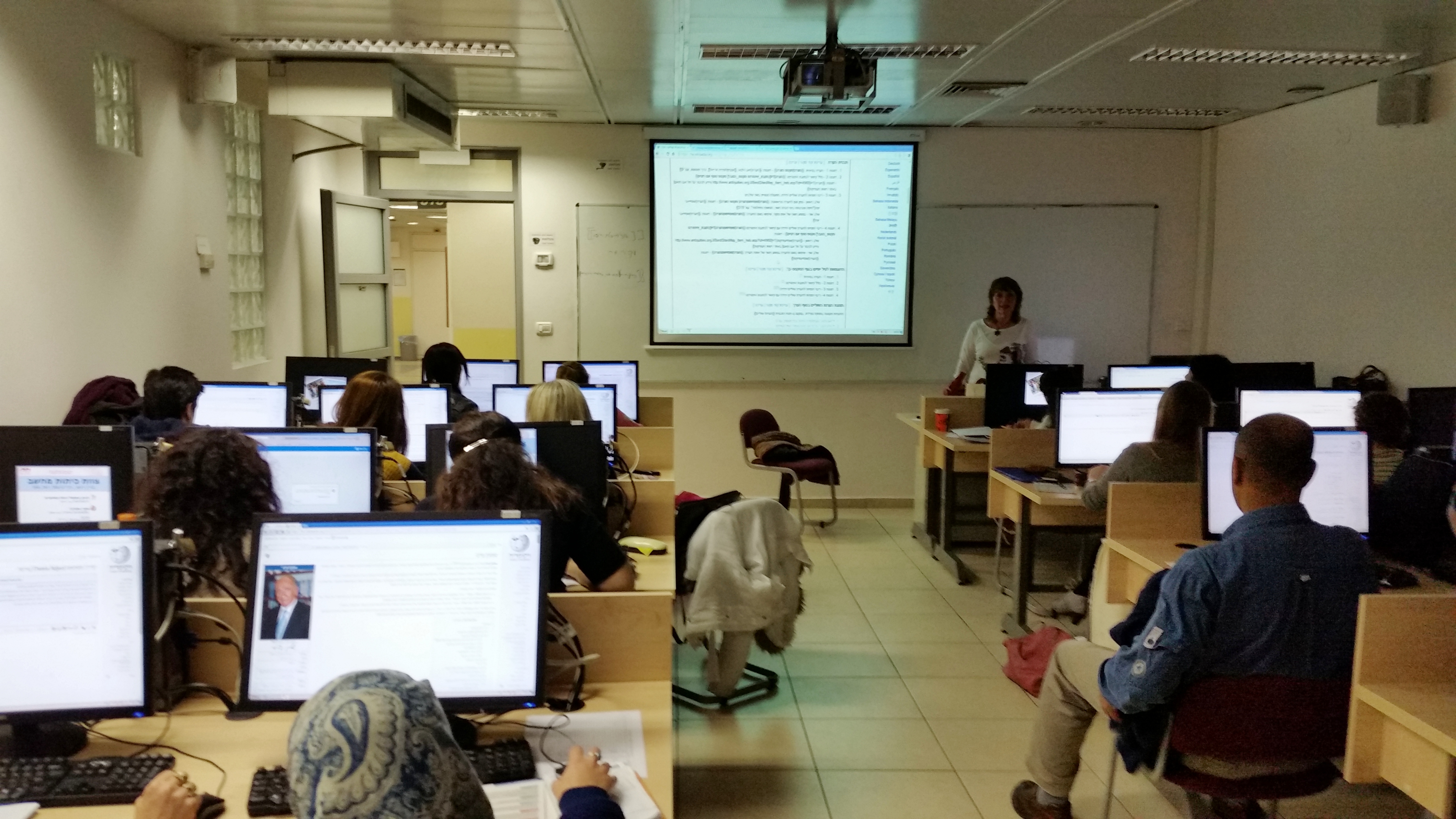 סטודנטיות וסטודנטים בלימודי נשים ומגדר לתואר שני באוניברסיטת חיפה עוברים הדרכה בכתיבת ערכים כמטלה אקדמית במסגרת מיזם של שיתוף פעולה בין הפקולטה למדעי הרוח באוניברסיטת חיפה והוויקיפדיה העברית למידע נוסף ראו כא